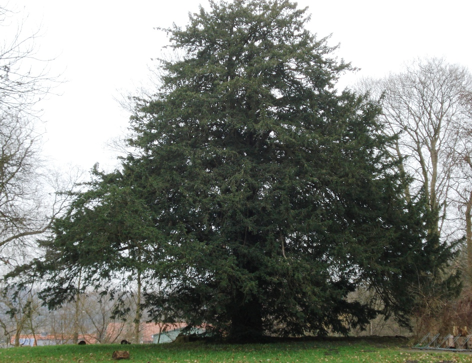 Die Fintbeker Eibe